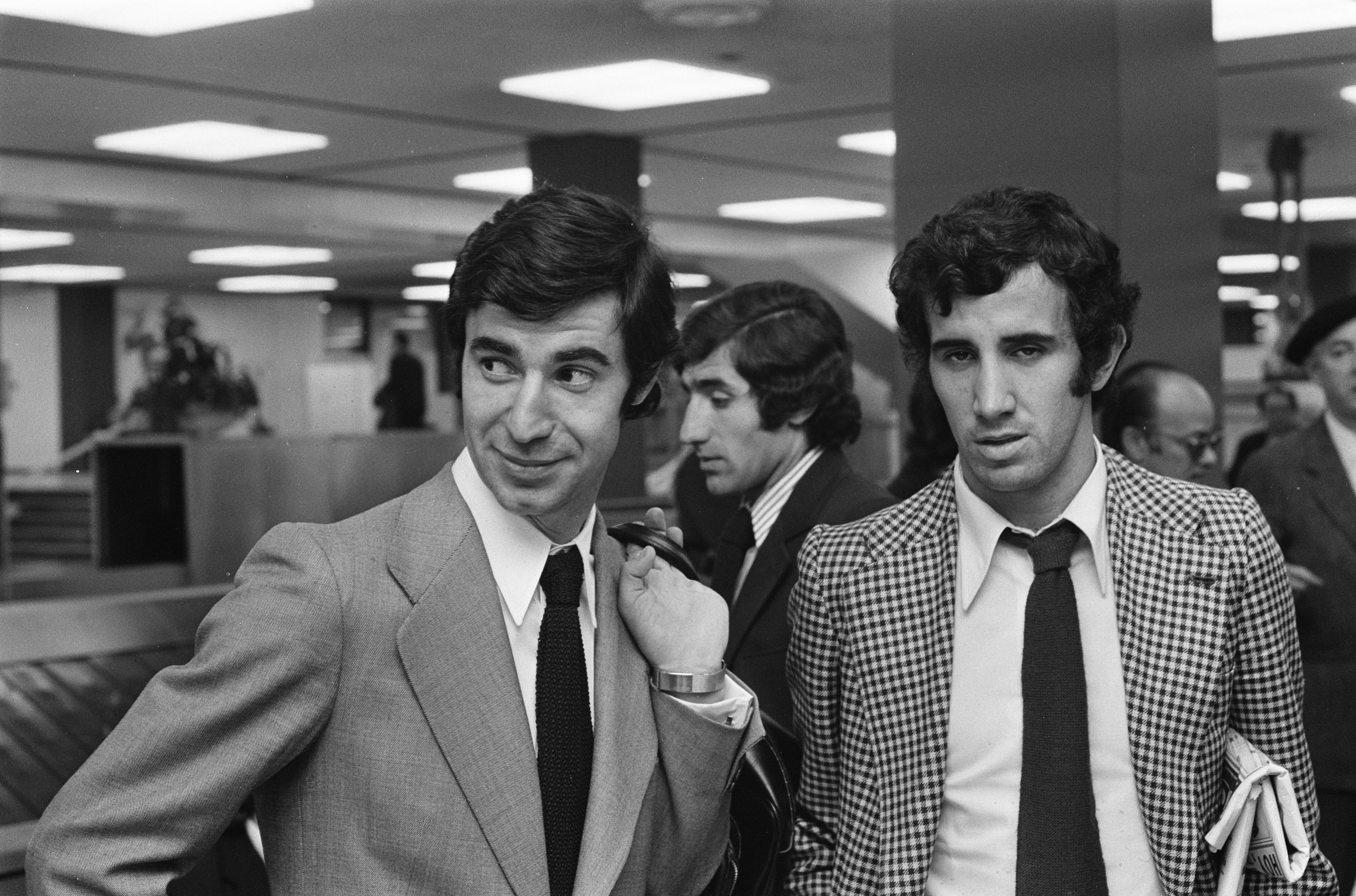 Spaans Nationaal Team op Schiphol, Isureta en Garate ( Atletico Madrid )